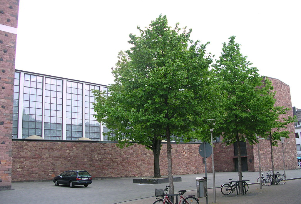 Annakirche in Düren